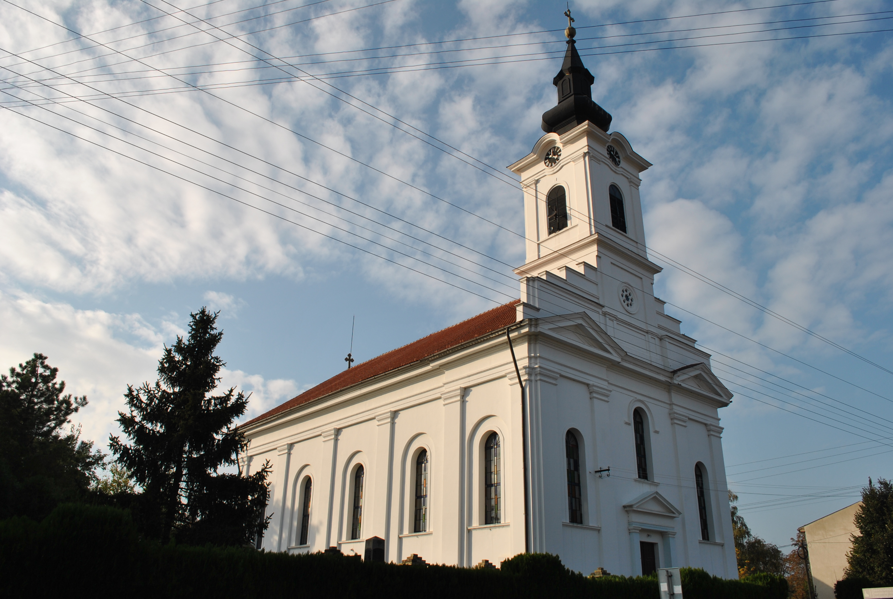 Kulpín - Srbsko - protestantský (slovenský) kostol z rokov 1875 - 1877